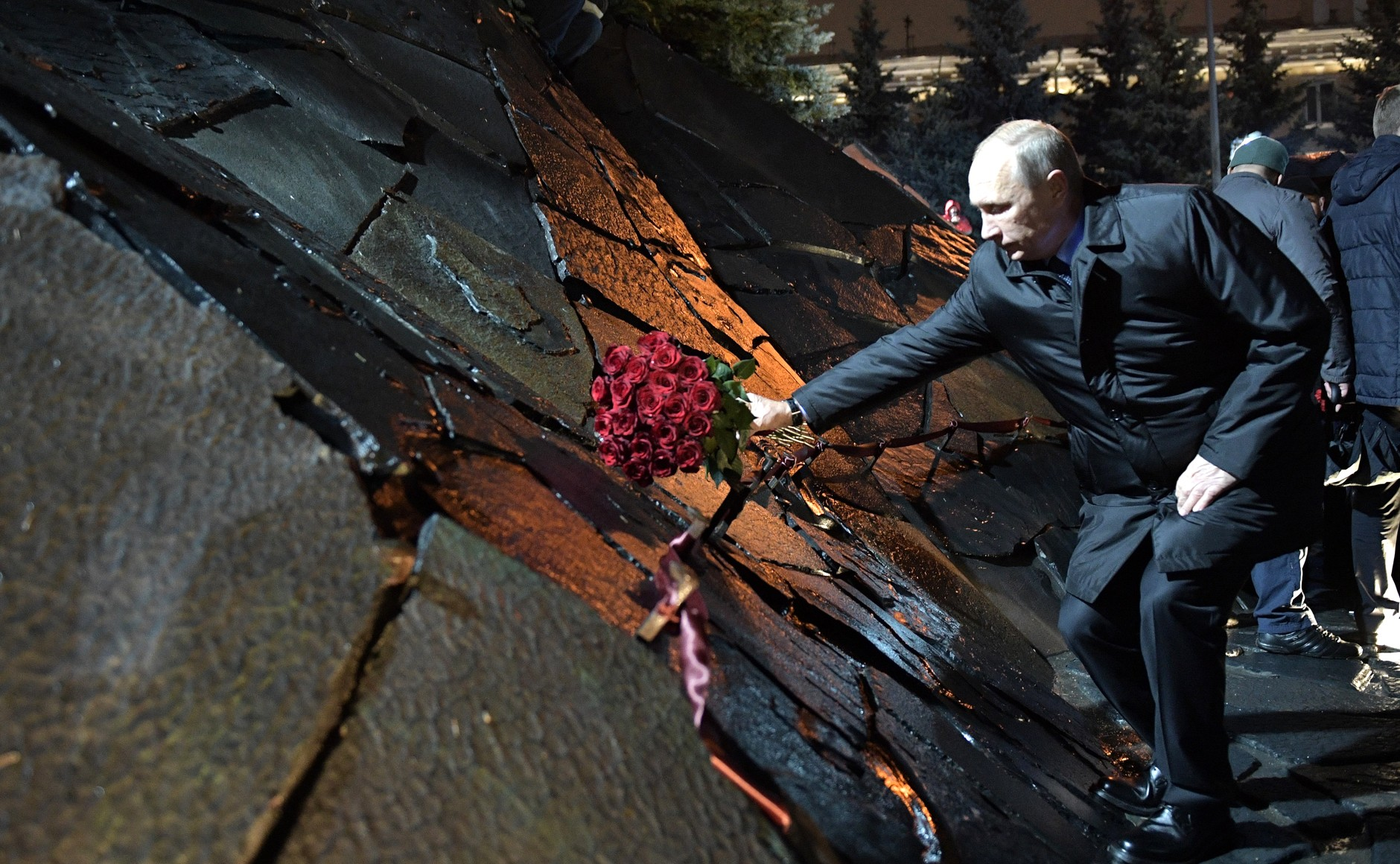 На церемонии открытия мемориала памяти жертв политических репрессий «Стена скорби».